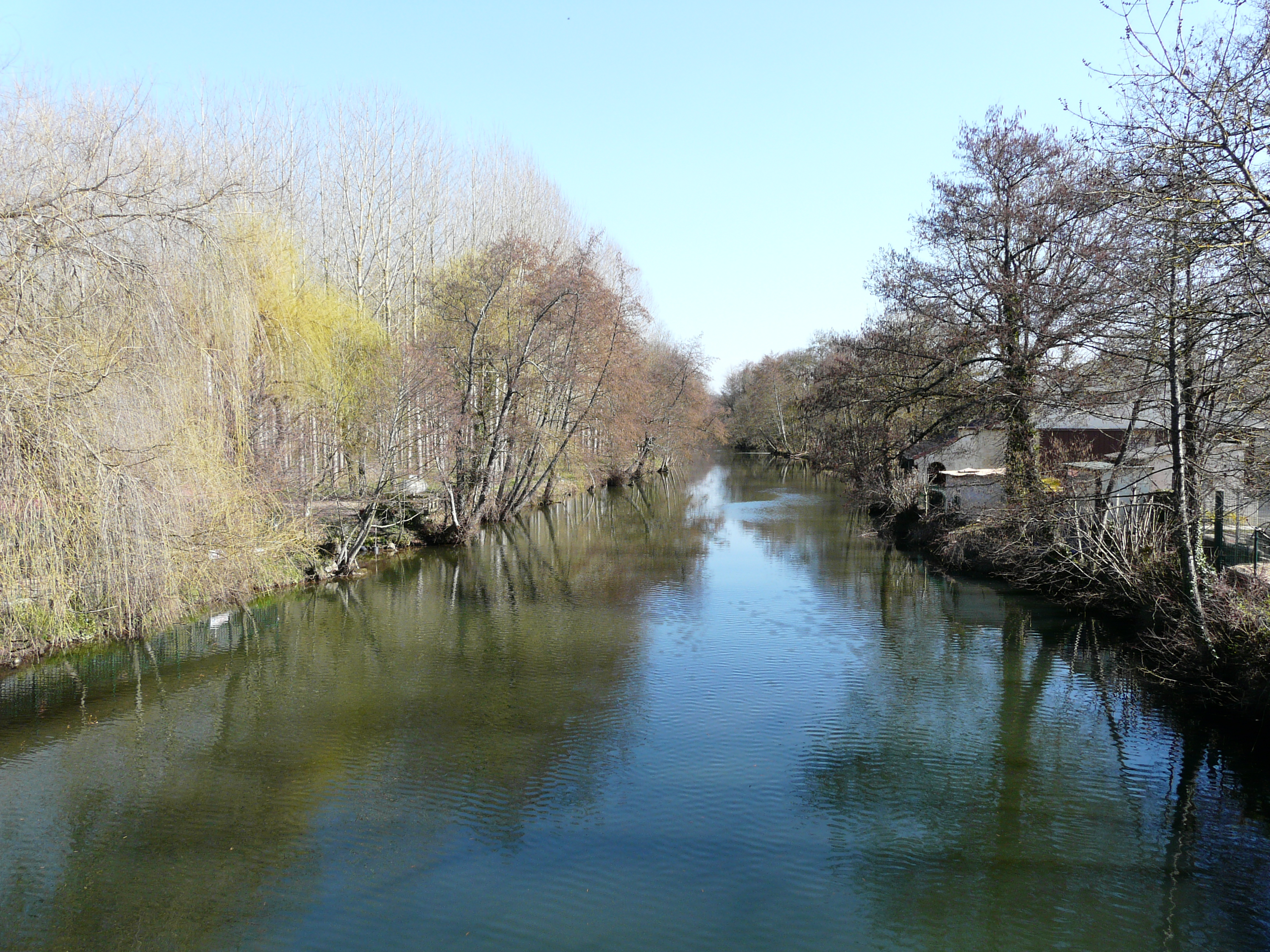 La Dronne en amont du pont de la route départementale 708, marque la limite entre Villetoureix (à gauche) et Ribérac (à droite), Dordogne, France.